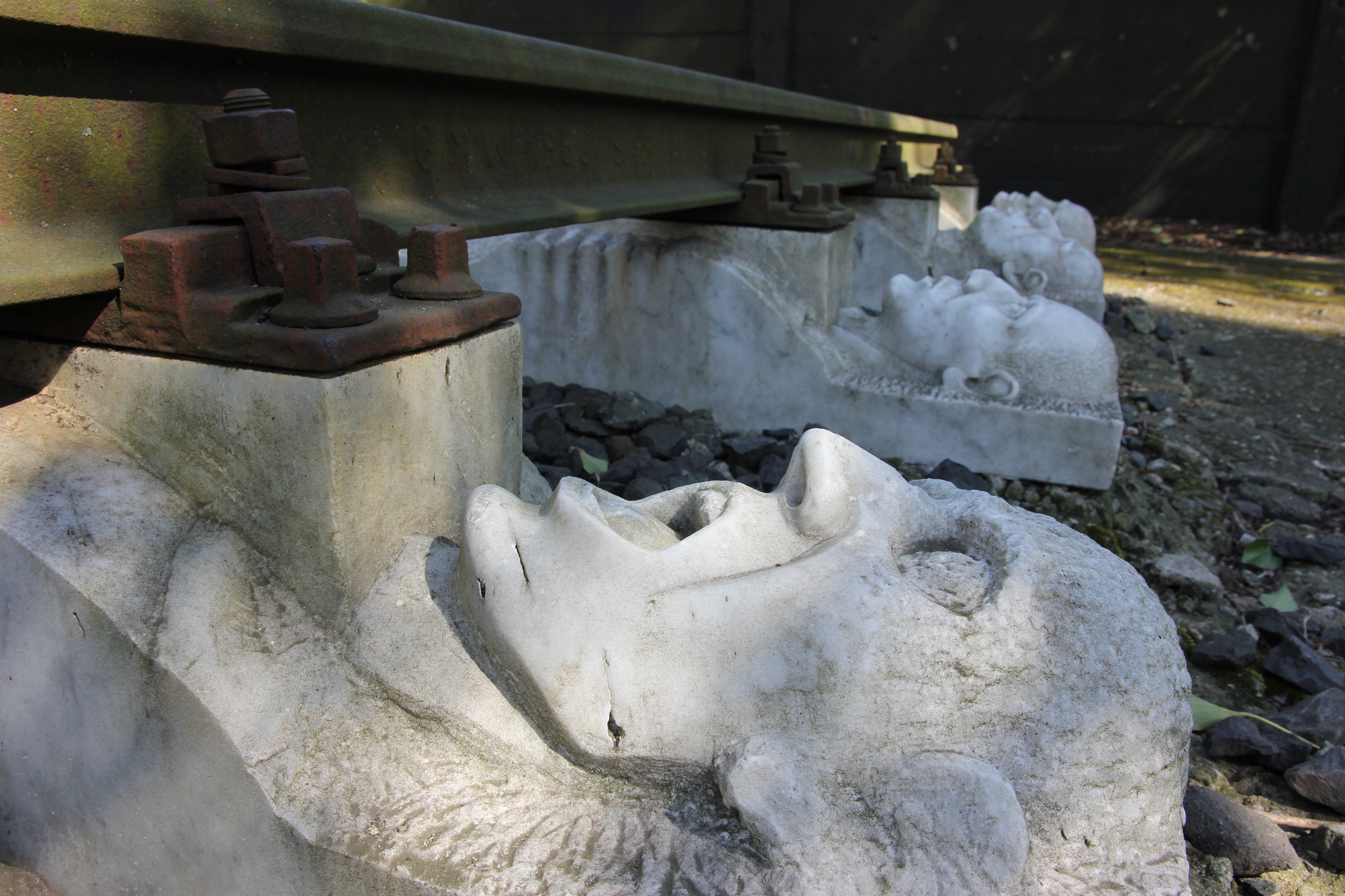 Gedenkstätte an das Außenlager vom ehemaligen KZ-Buchenwald in Schwerte Ost